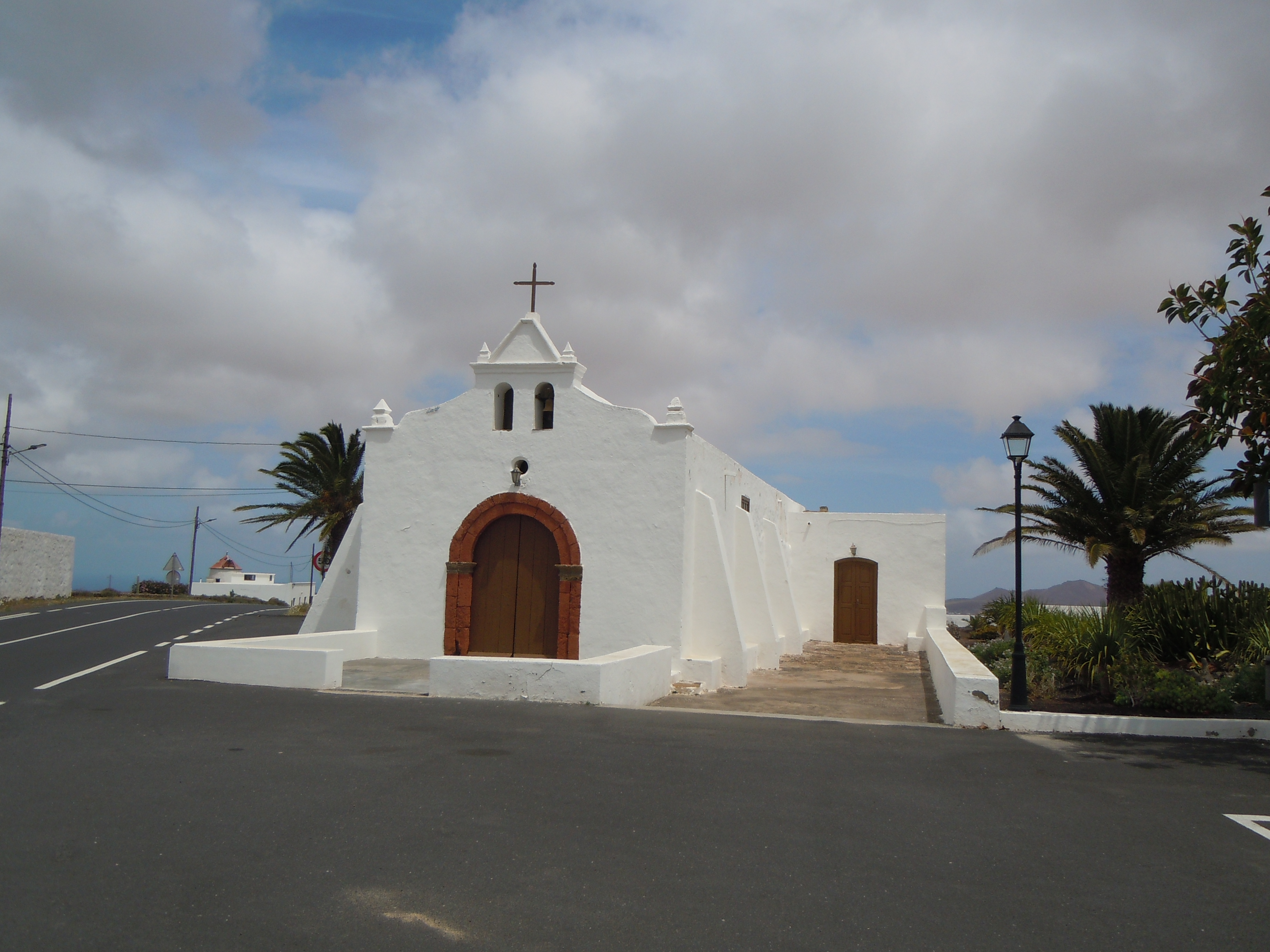 Église de Nuestra Senora del Socorro, Tiagua, Lanzarotte